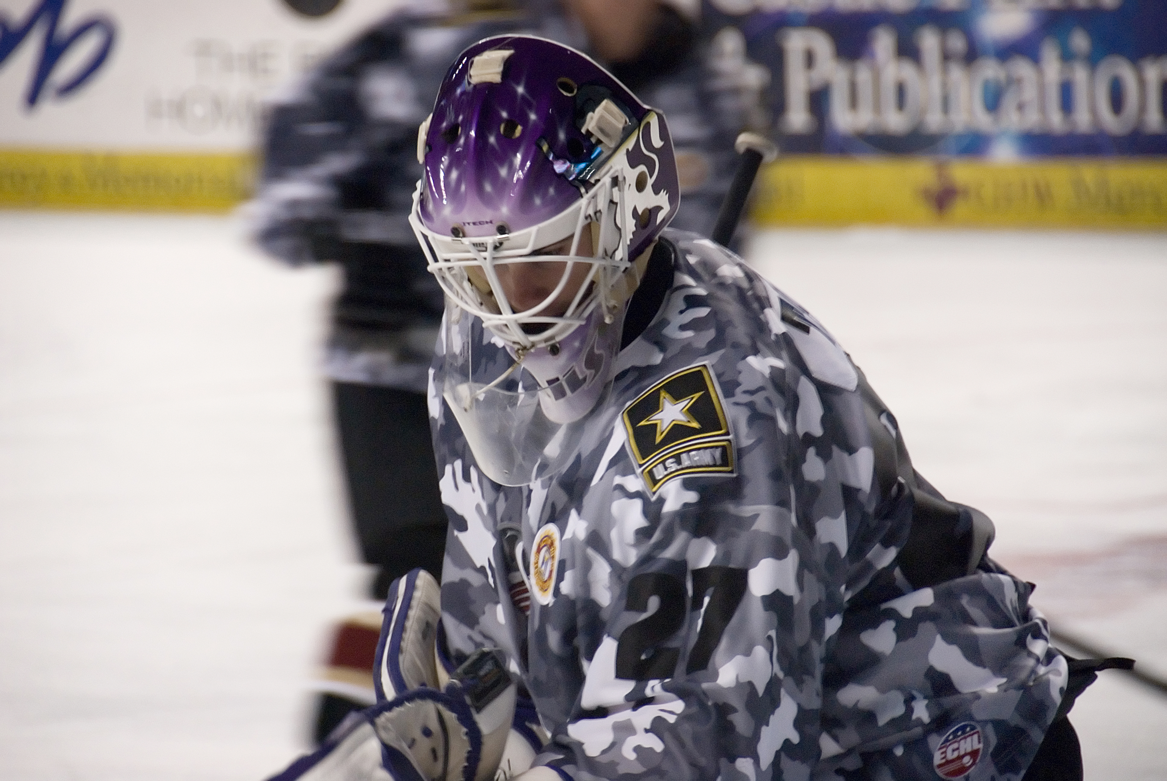 Danny Taylor